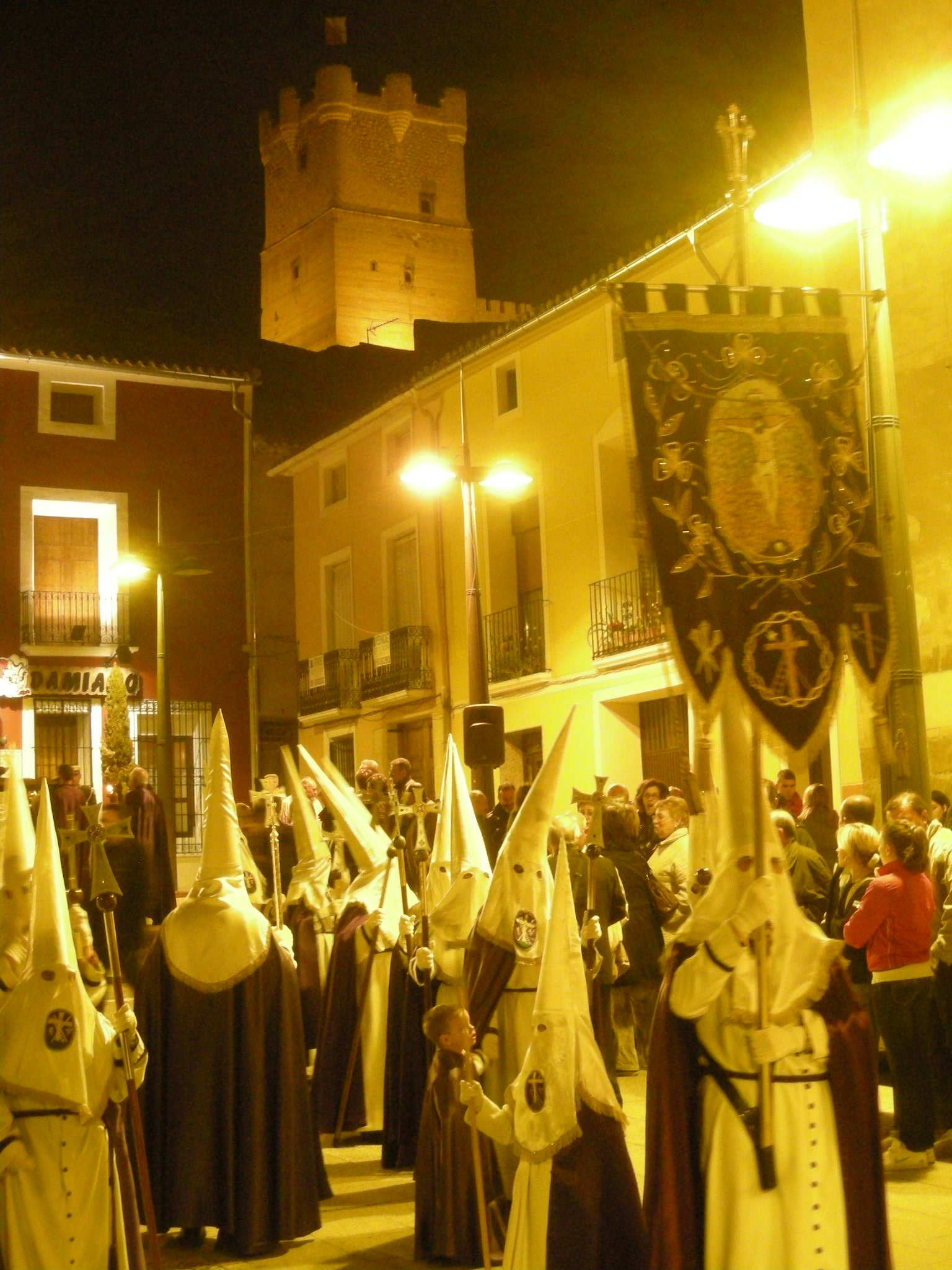 Imagen una procesión de la Semana Santa de Villena